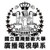 中文（台灣）: 國立臺灣藝術大學廣播電視學系